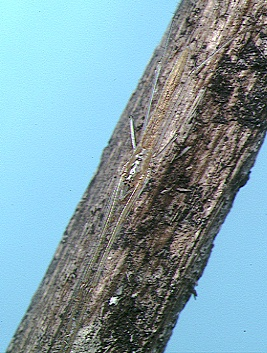 male Tetragnatha javana from Okinawa.